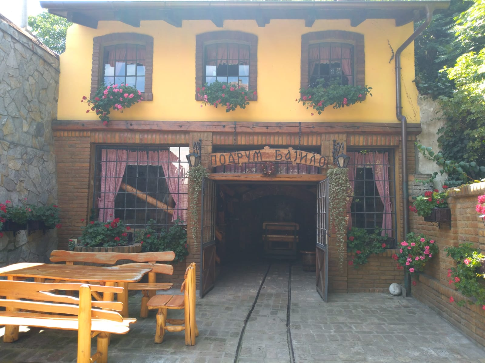 Podrum vina Bajilo u Sremskim Karlovcima.